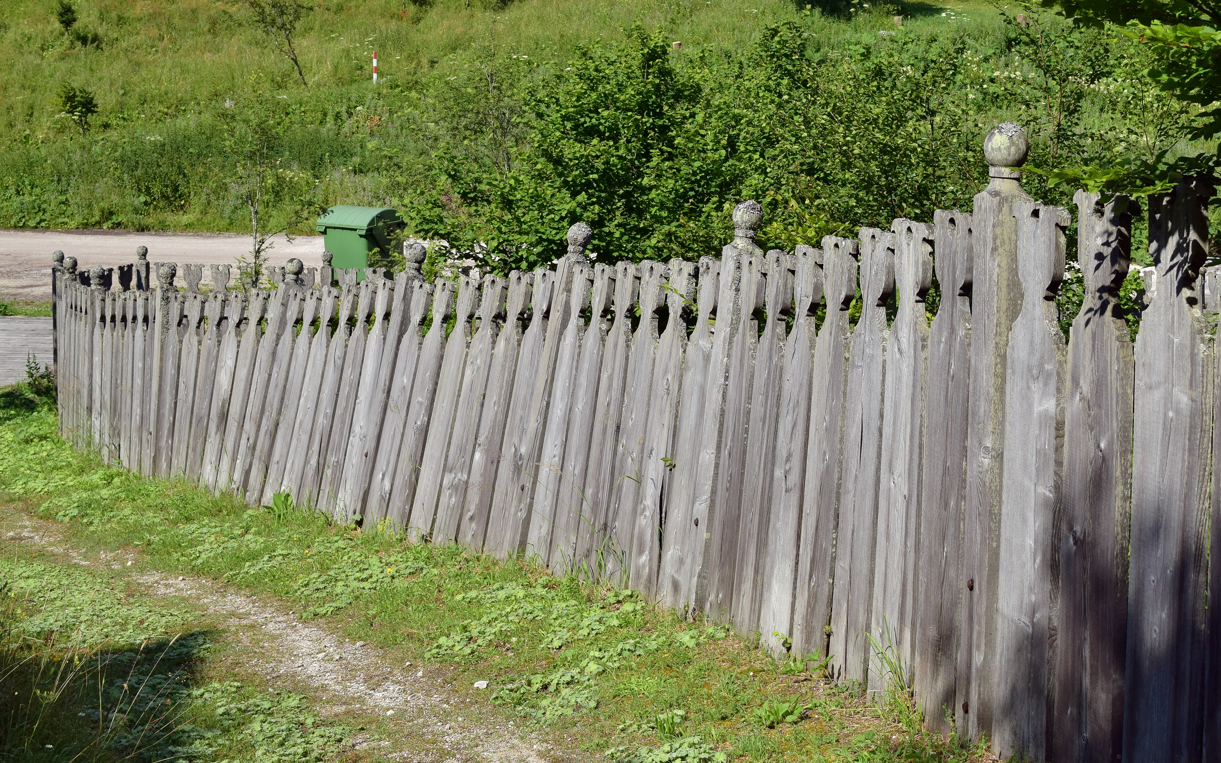 Gutshof in Neuhaus, Gemeinde Gaming